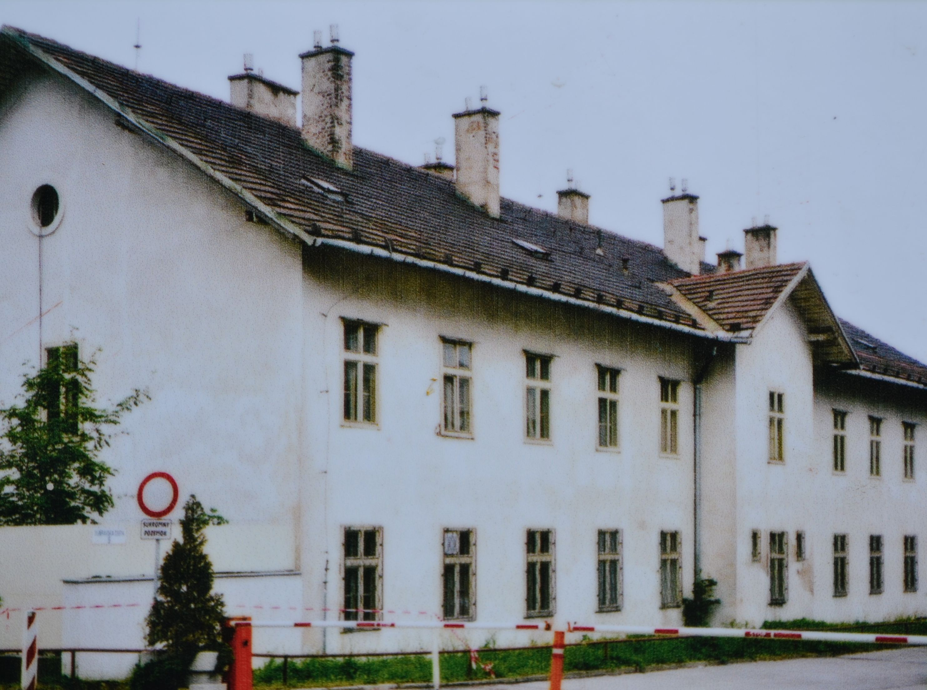 VI. mlyn. Jedna z pôvodných budov sa nachádzala na Patrónke a v druhej pol. 19. stor. sa stala súčasťou Rothových závodov na muníciu